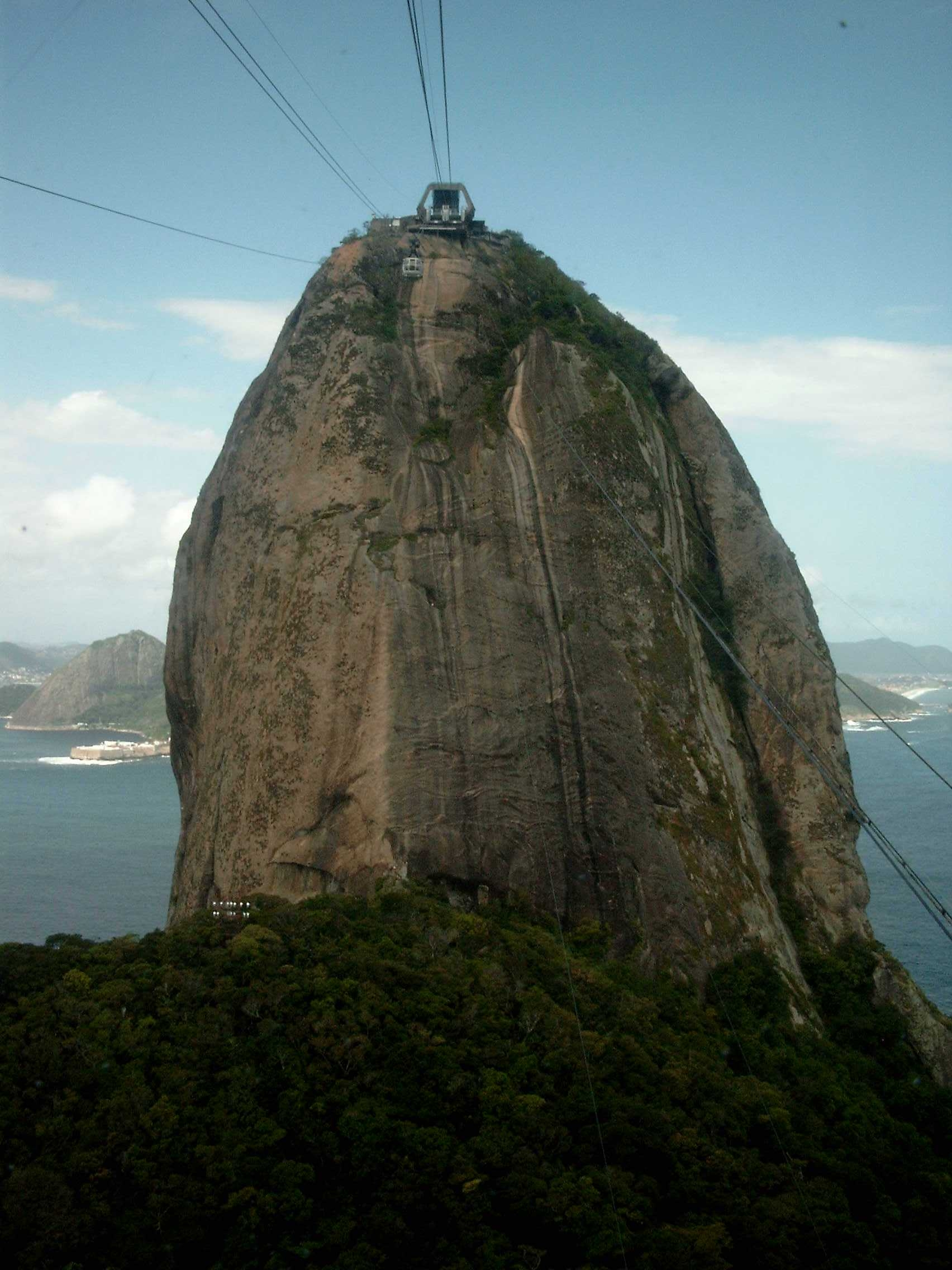 Pain de Sucre à Rio de janeiro